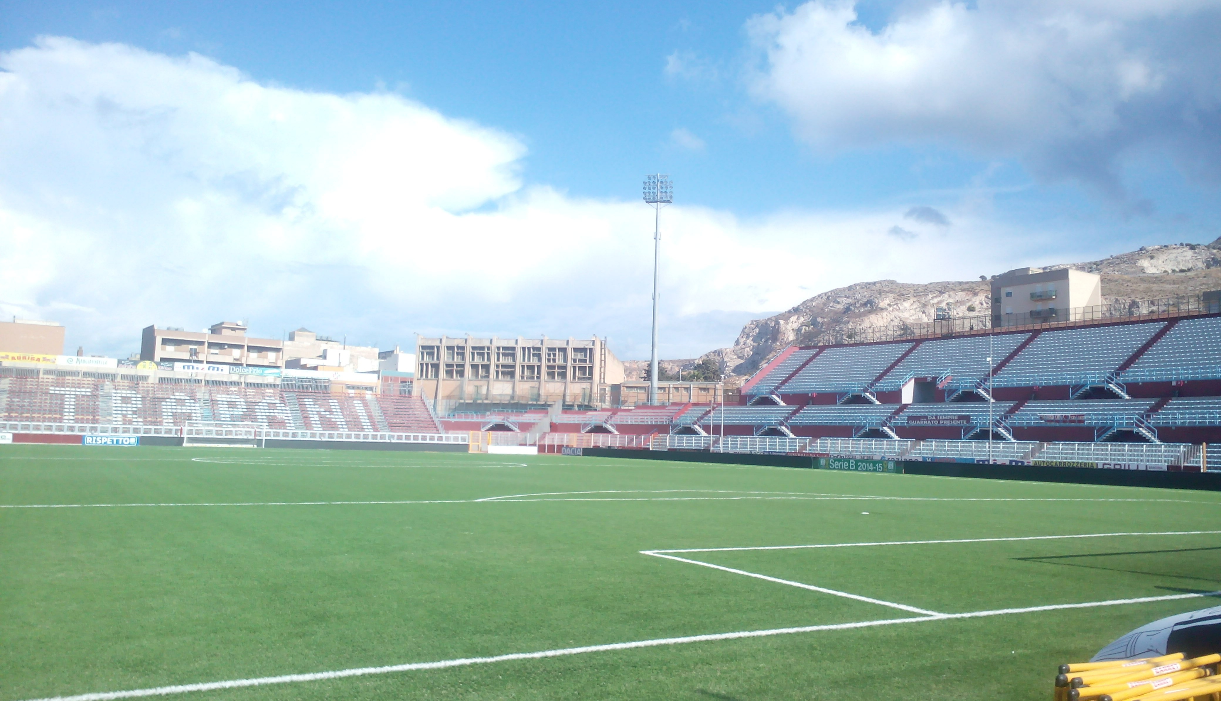 Le nuove curva e gradinata, e il manto in sintetico dello stadio polisportivo provinciale di Trapani, inaugurate nell'agosto 2014